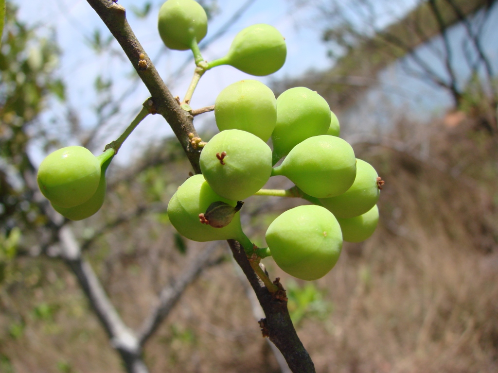 Pera glabrata - EUPHORBIACEAE - Parque Nacional de Brasília - Distrito Federal - Brasil.